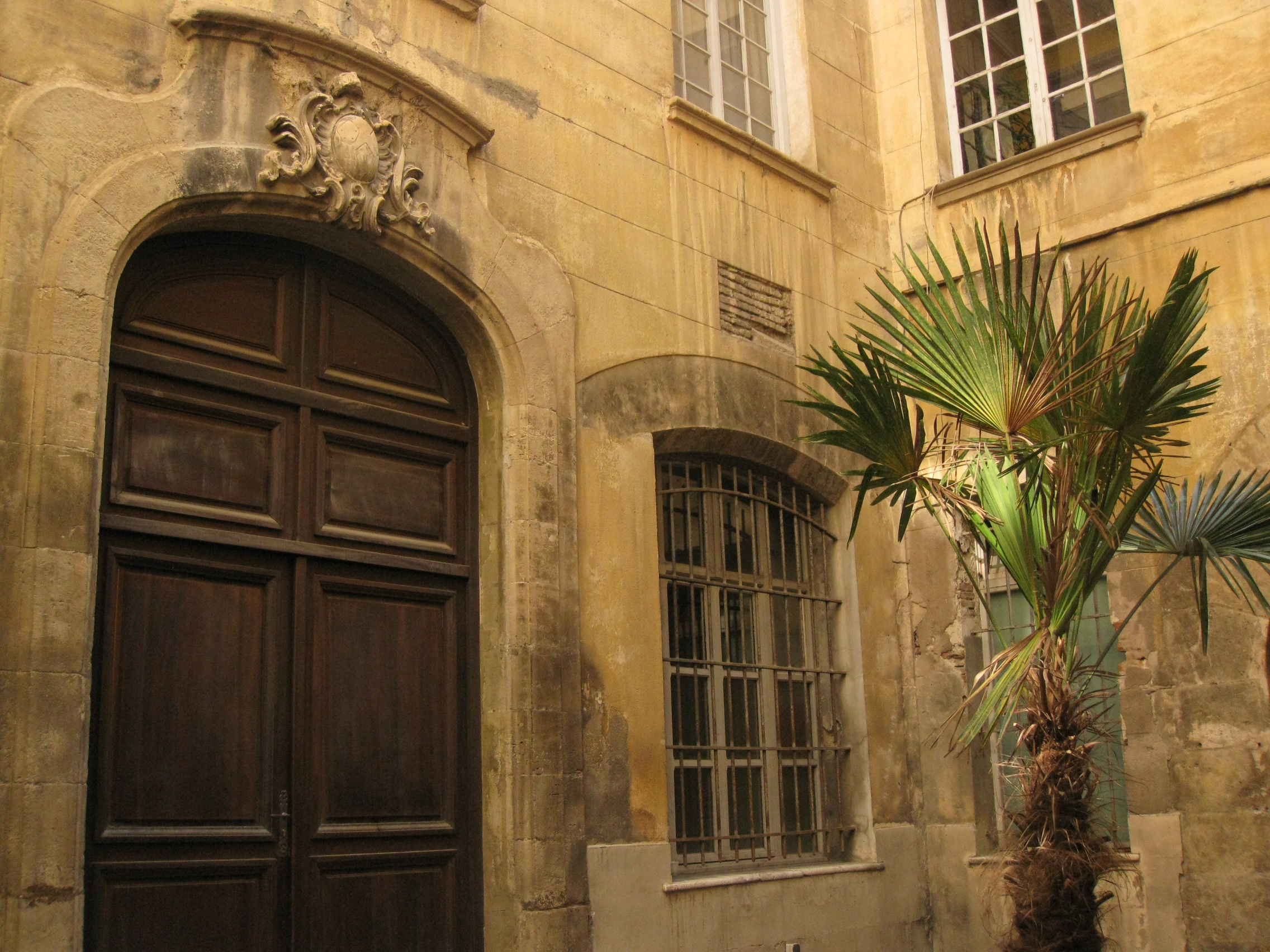 Palau de la Generalitat o de la Diputació, a Perpinyà; detall del pati .